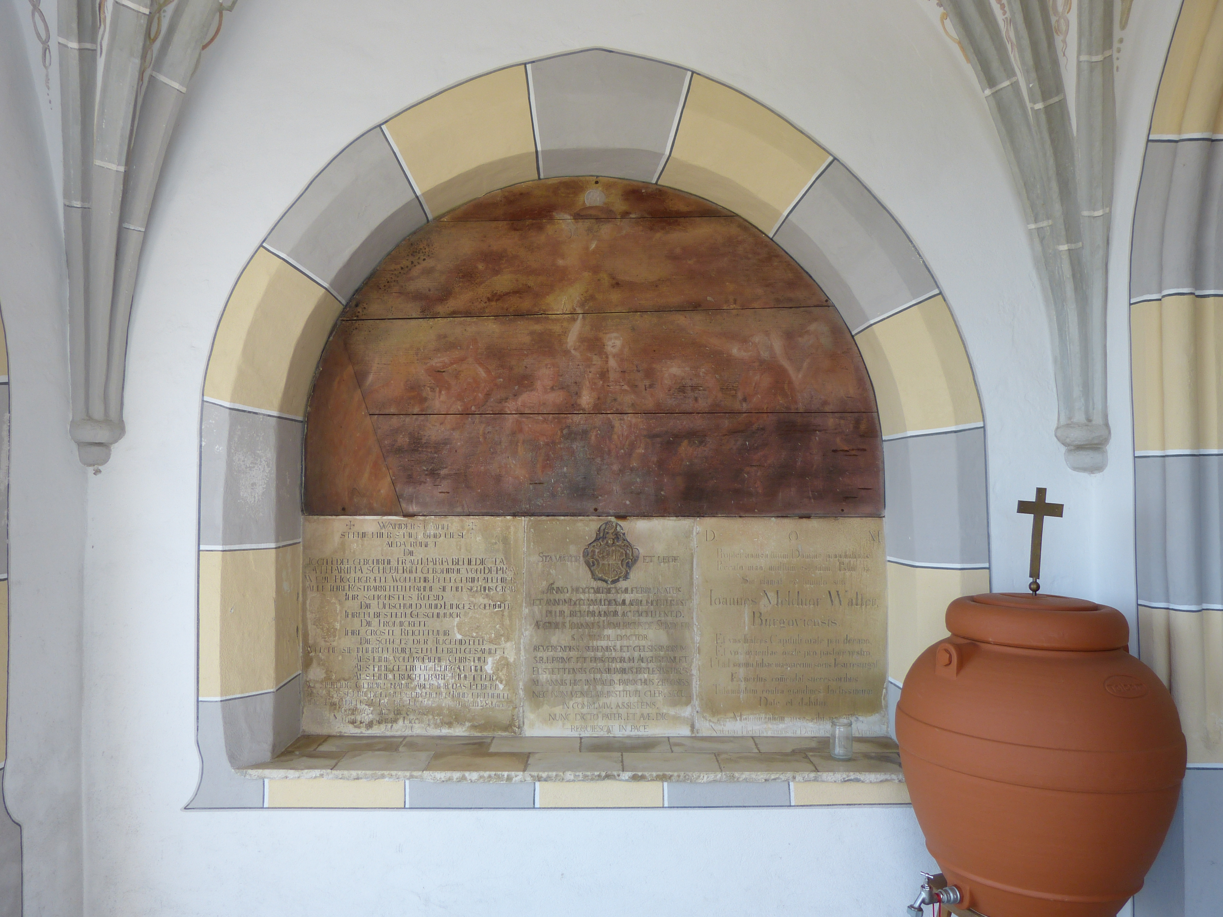 Mariä Himmelfahrt, Markt Wald, Landkreis Unterallgäu, Bayern, Deutschland